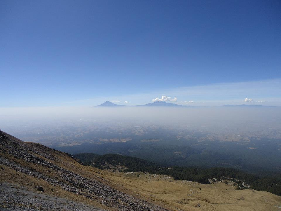 Vista de los volcanes desde la cima del volcán Malintzin